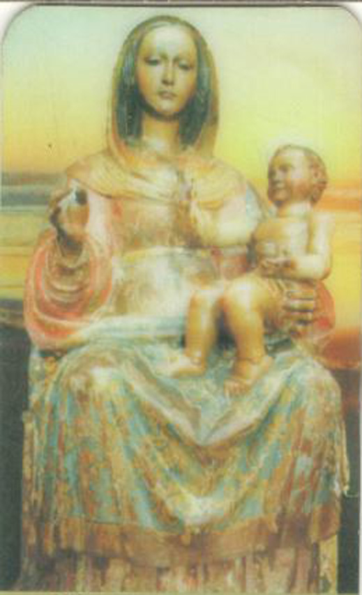 imagen detallada en madera de la virgen Margarita Concepción sin vestidura adicional, con colores originales y sin ornamentos